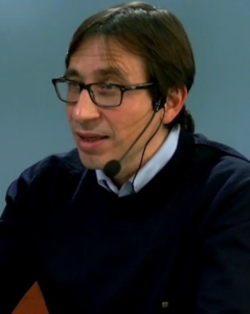 Ramón Marcos